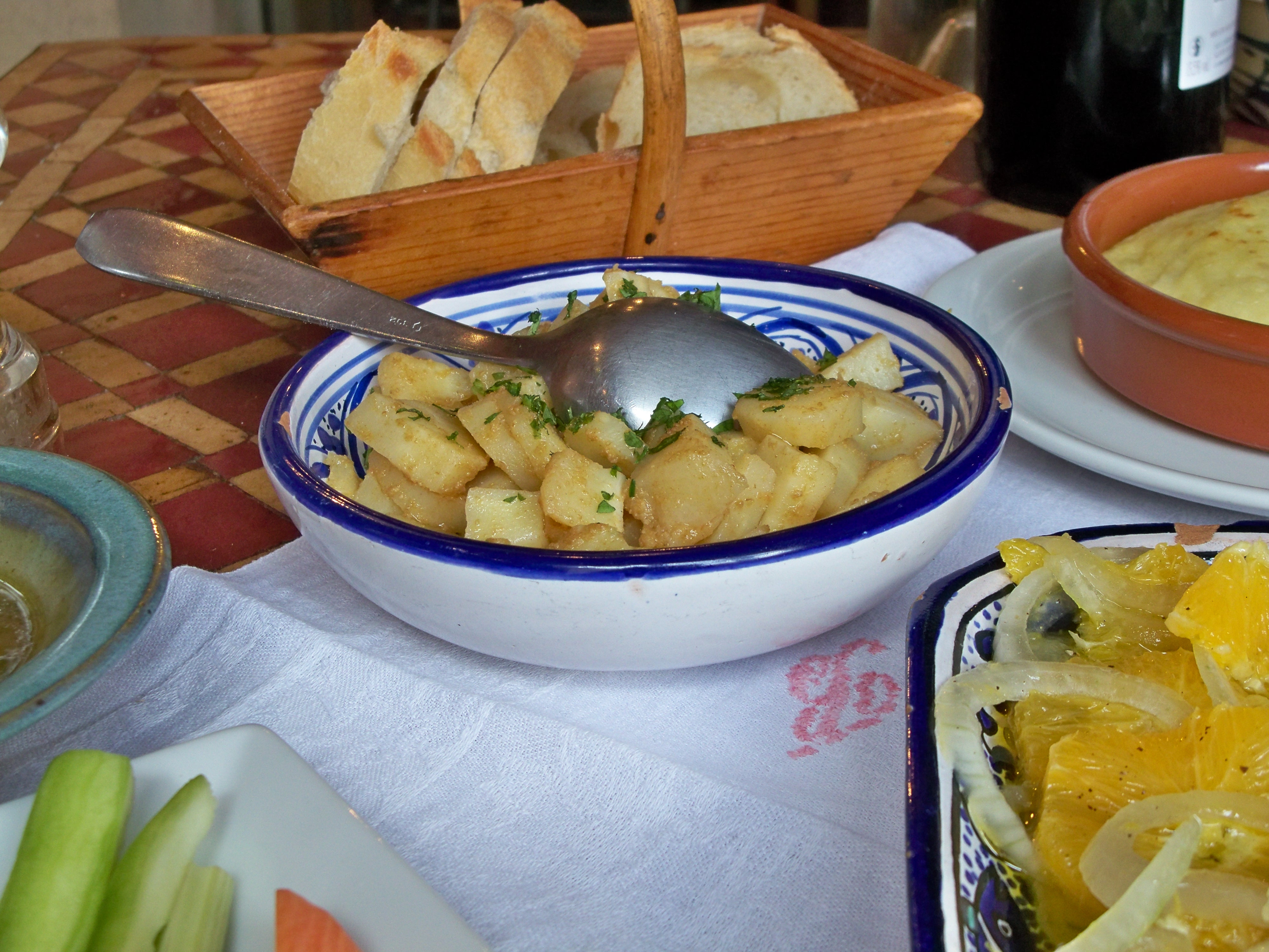 salade de panais du bistrot de pays de Lardiers (04)